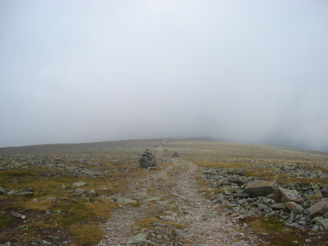 Sentier menant au sommet du Mont Jacques-Cartier Source: Jean-Philippe Caron }~Pyb 26 octobre 2006 à 20:15 (CEST)